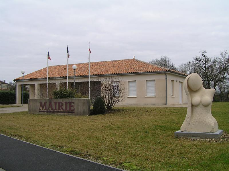 mairie de Nercillac